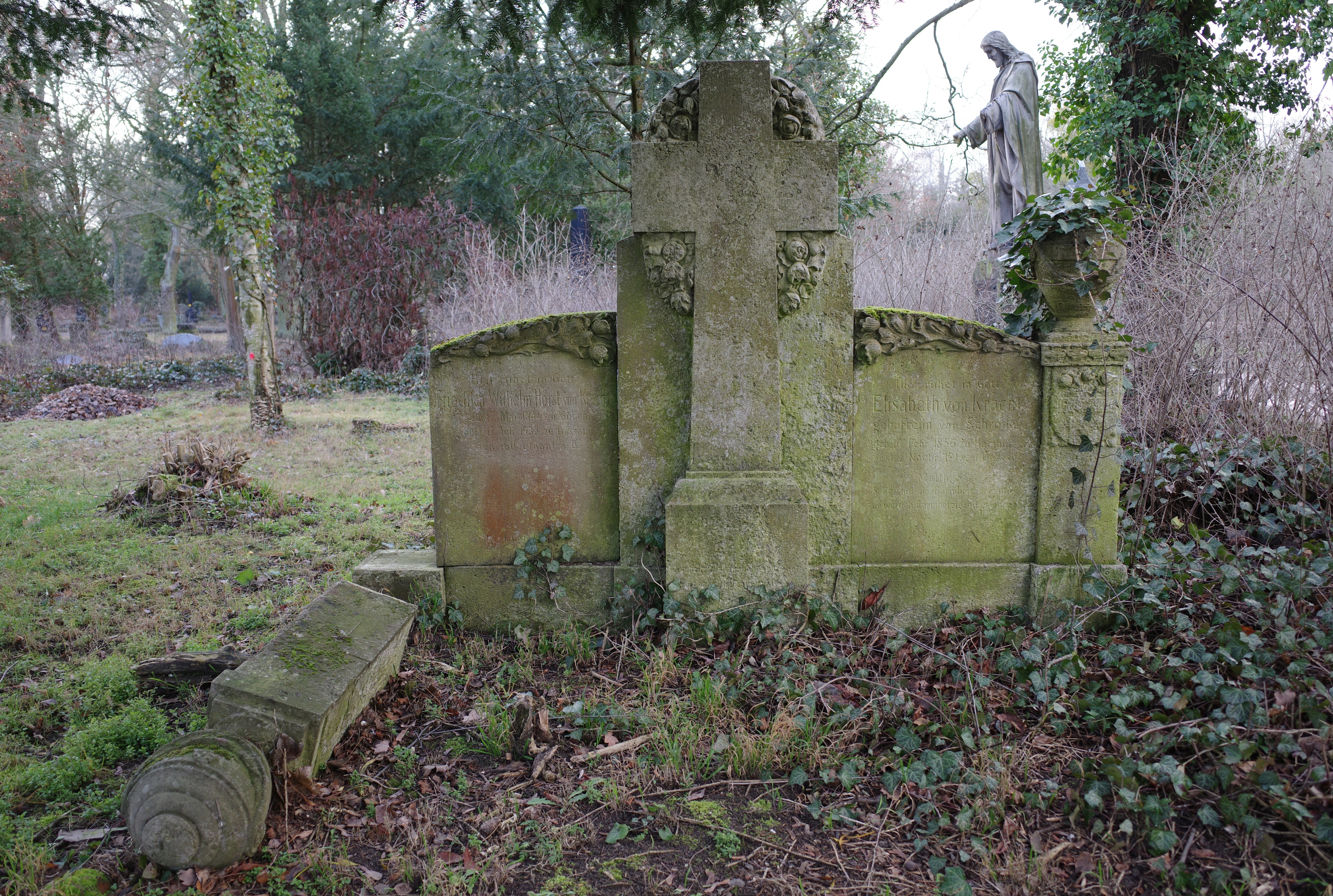 Friedrich Wilhelm Horst von Kracht, Generalleutnant a.D.. Grabmahl auf dem Friedhof 3 in Dessau.